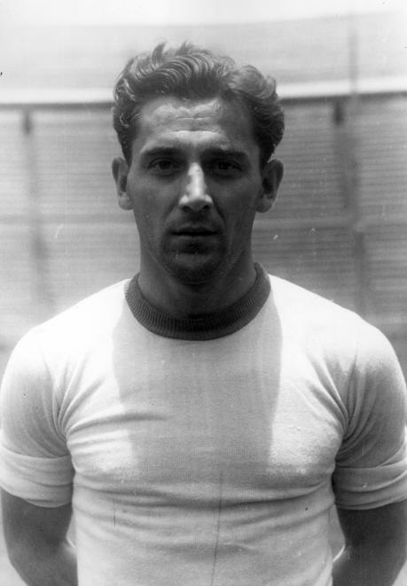 Azul Stadion. Rudas Ferenc. A felvétel a Ferencváros mexikói túráján 1947 nyarán készült.